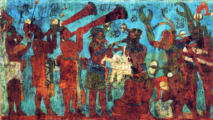 Музыканты с трубами и танцоры в костюмах крабов. Фреска из Бонампака, комната 1, фрагмент северной стены. 790-е гг.